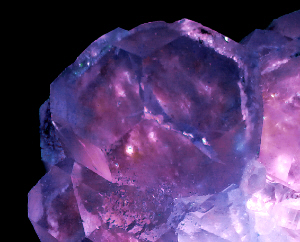 蛍石（切稜立方体）